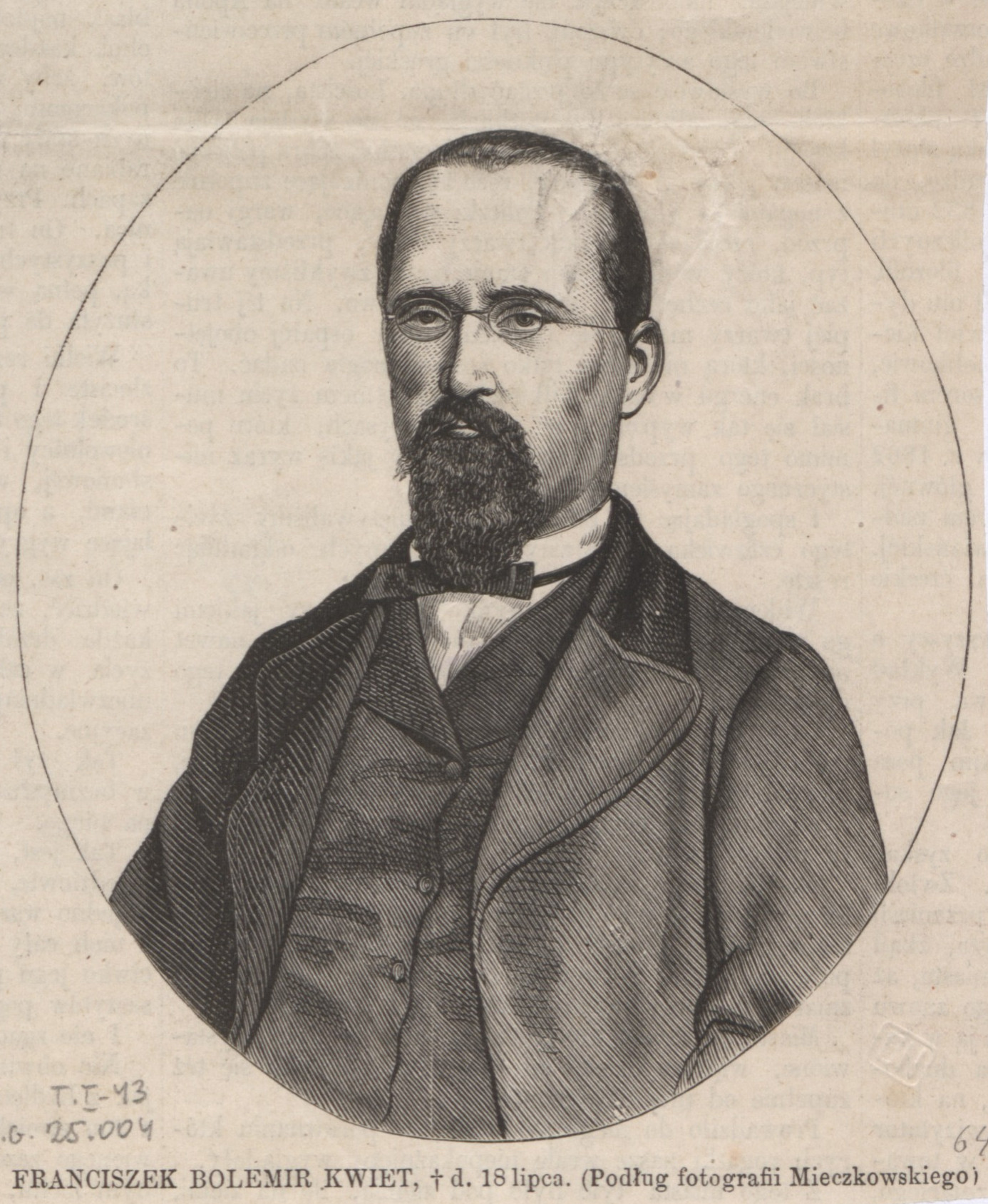 Franiszek Bolemir Kwiet